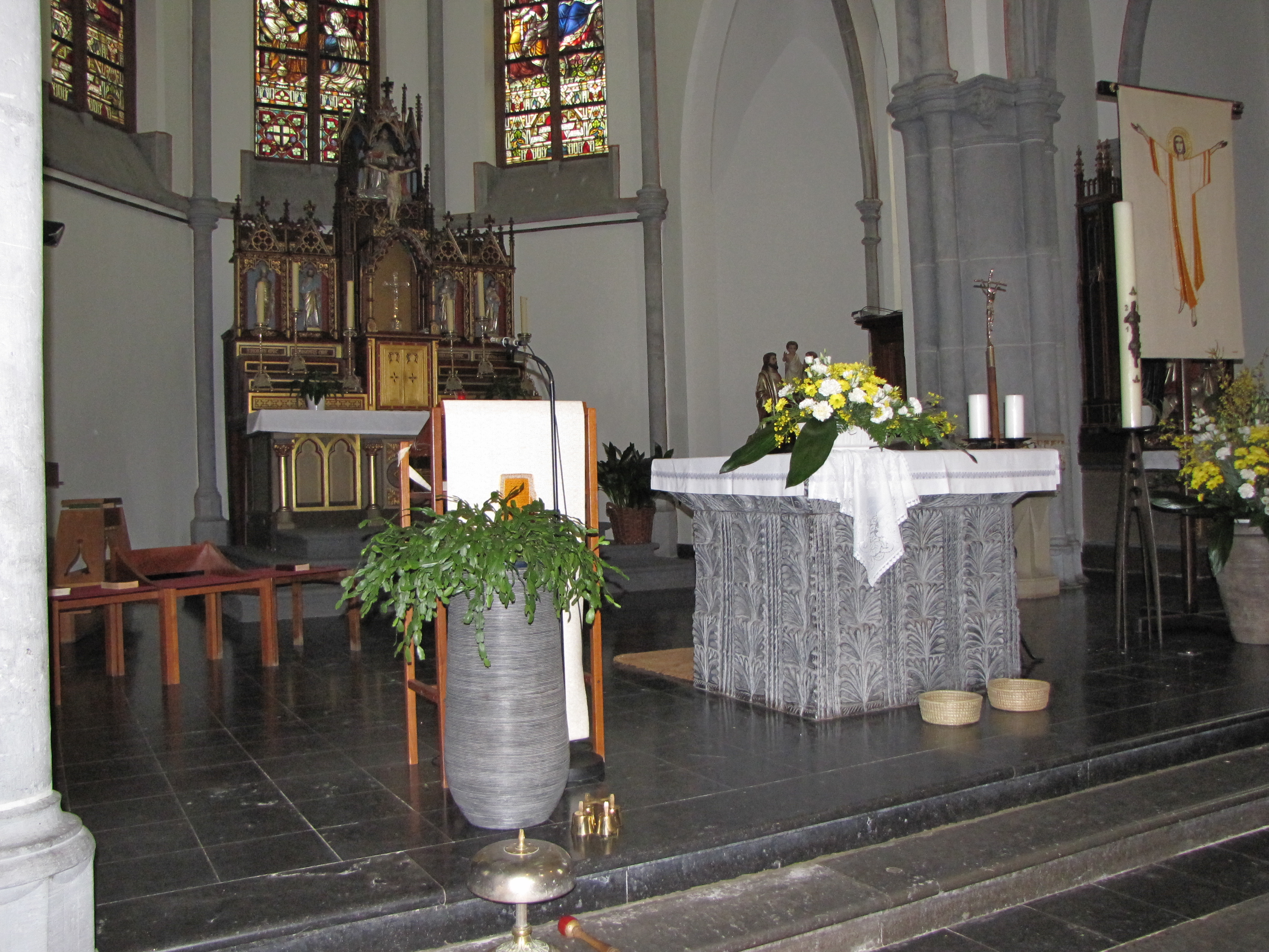 Eglise St Joseph, néogothique, Eupen